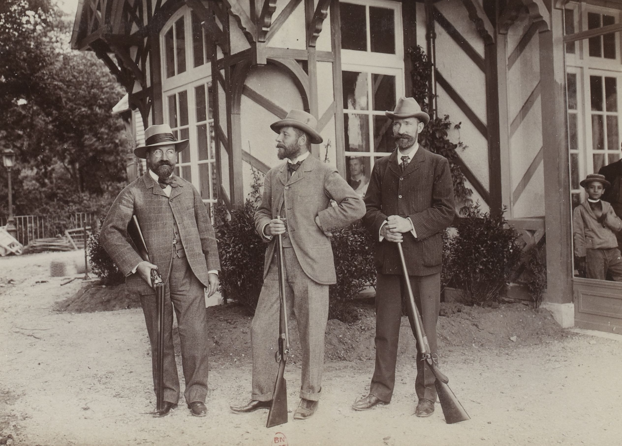 [Collection Jules Beau. Photographie sportive] : T. 13. Année 1900 / Jules Beau : F. 32. Grand Prix de l Exposition au Tir aux Pigeons, Cercle du Bois de Boulogne; Shooting at the 1900 Summer Olympics (live pigeon shooting) Maurice Fauré (France), Léon de Lunden (Belgium), Donald Mackintosh (Australia)